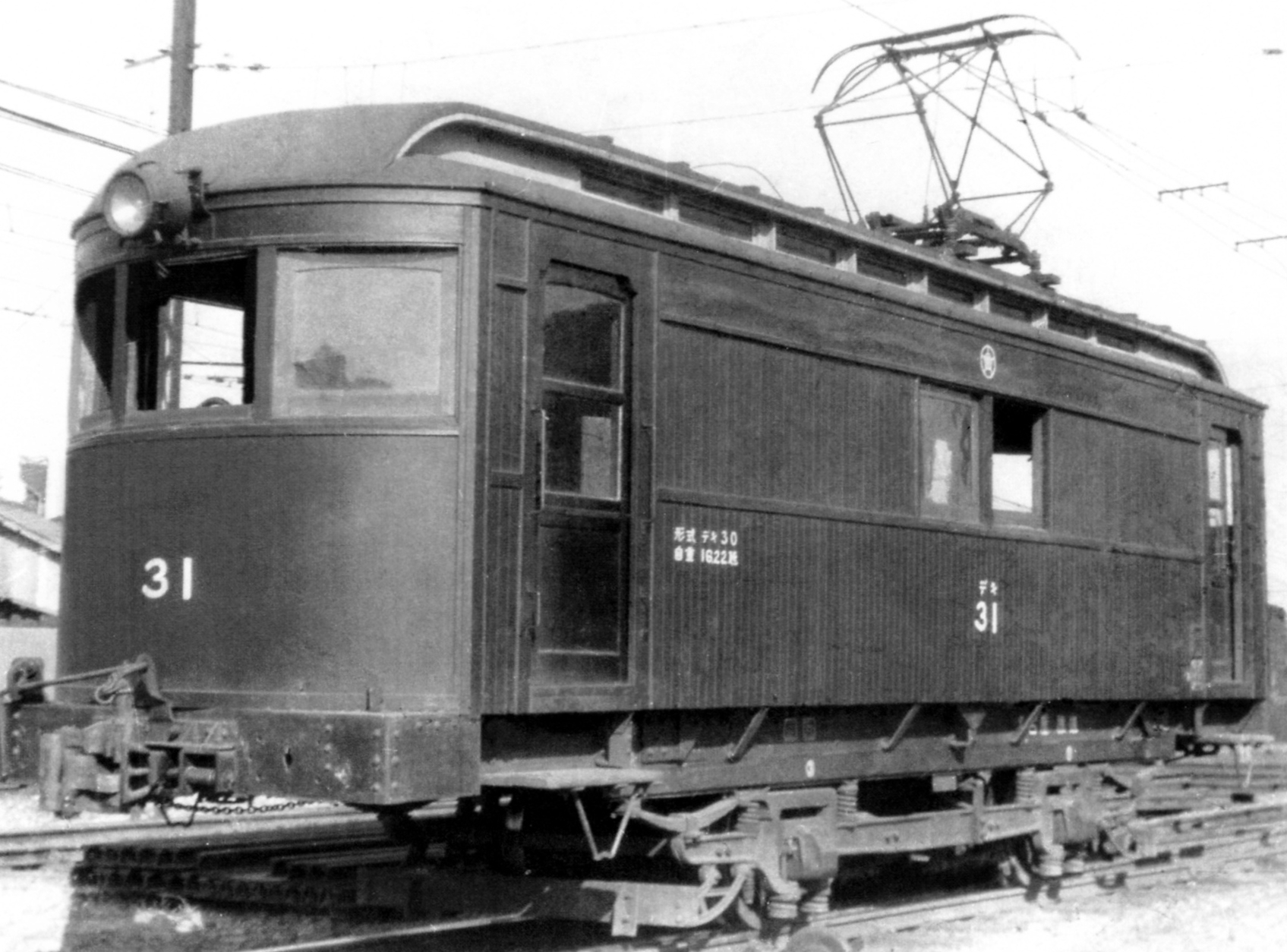 デキ30形電気機関車